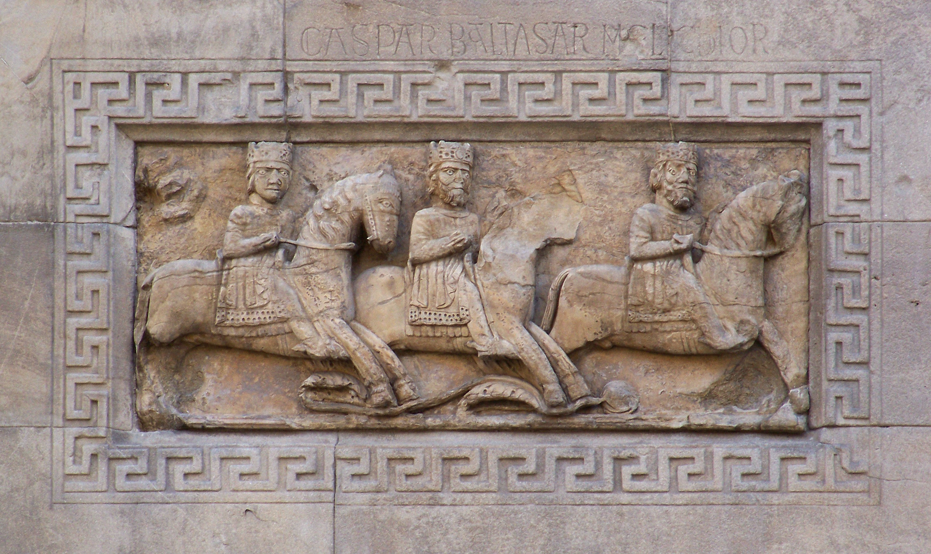 Duomo di Fidenza (provincia di Parma, Italy): bassorilievo con i tre Re Magi (Gaspare, Baldassarre e Melchiorre), situato sul lato frontale della torre campanaria di sinistra. XII secolo